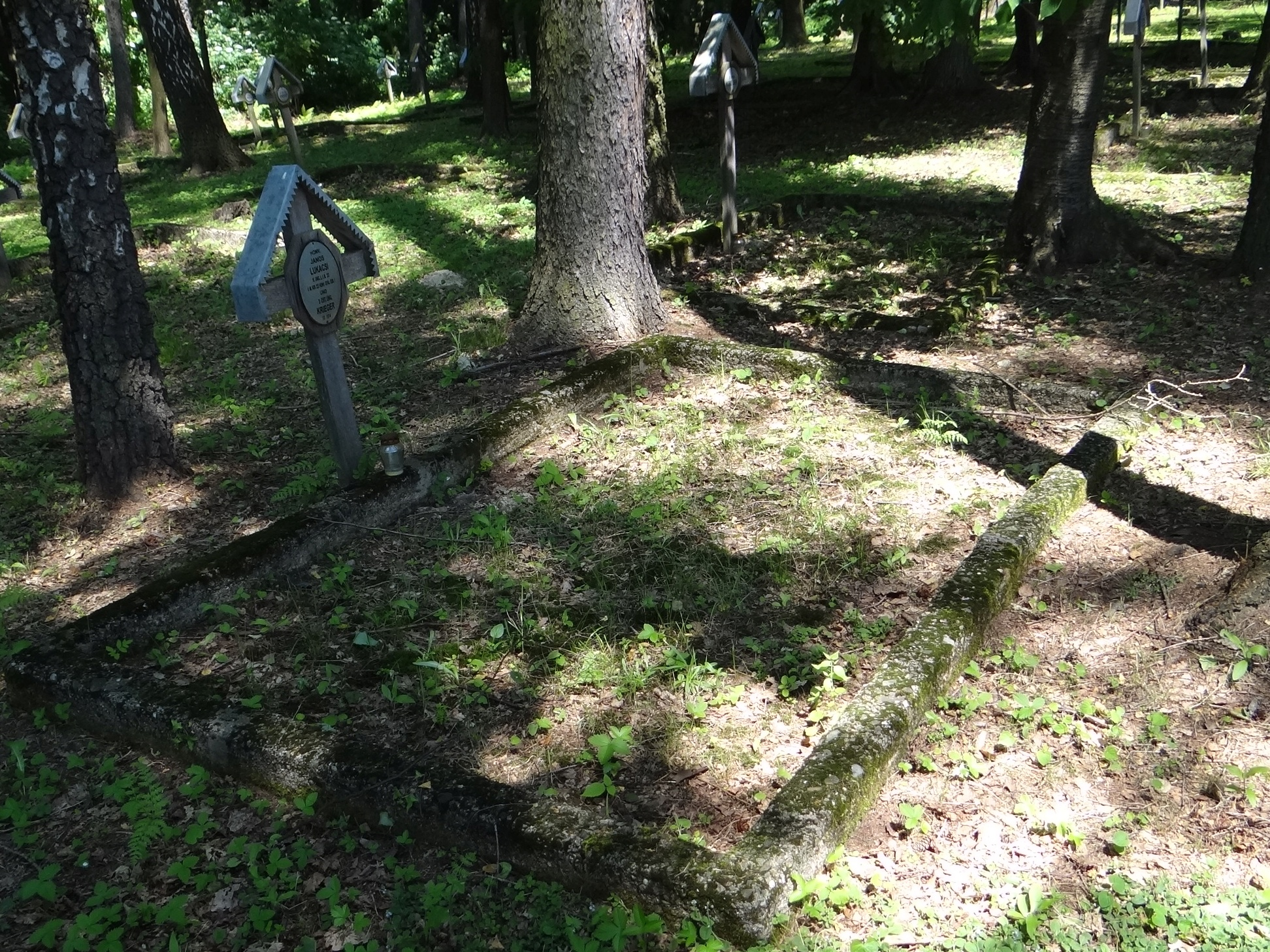 Cmentarz wojenny nr 164 - Tuchów